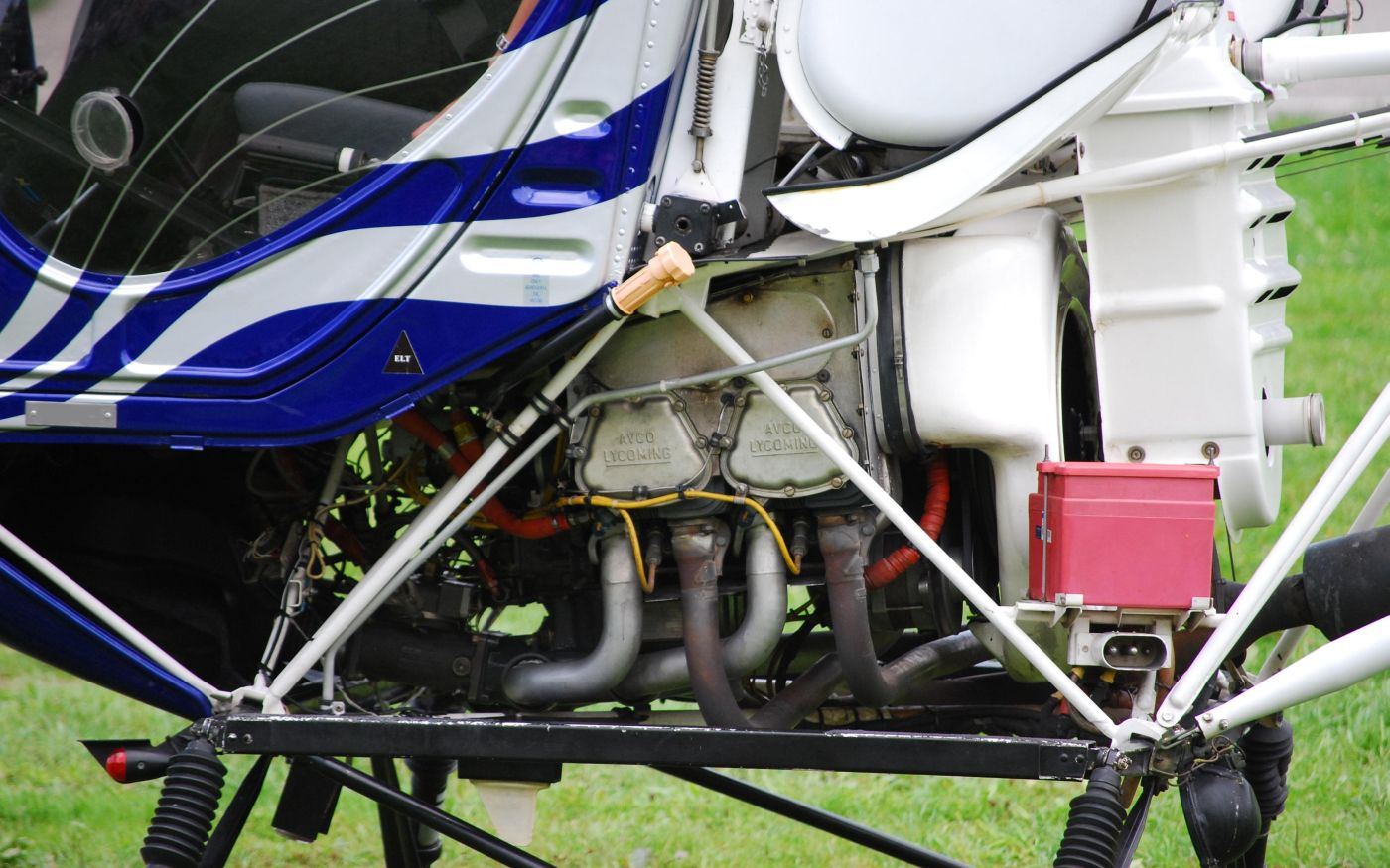 Motor im Hu269-Helikopter